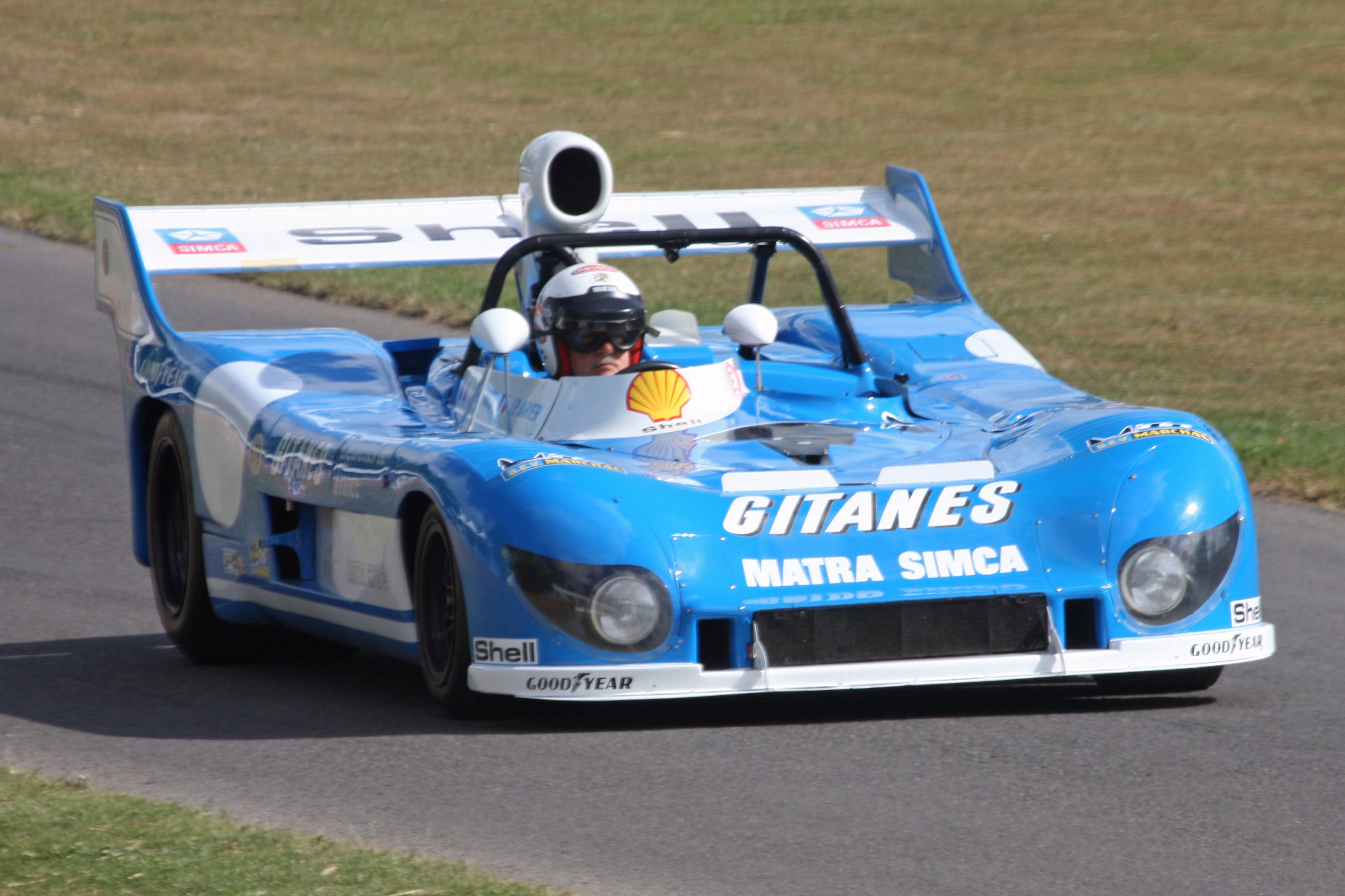 1974 Matra-Simca MS670C